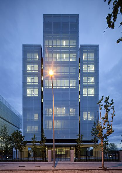 Allende Arquitectos